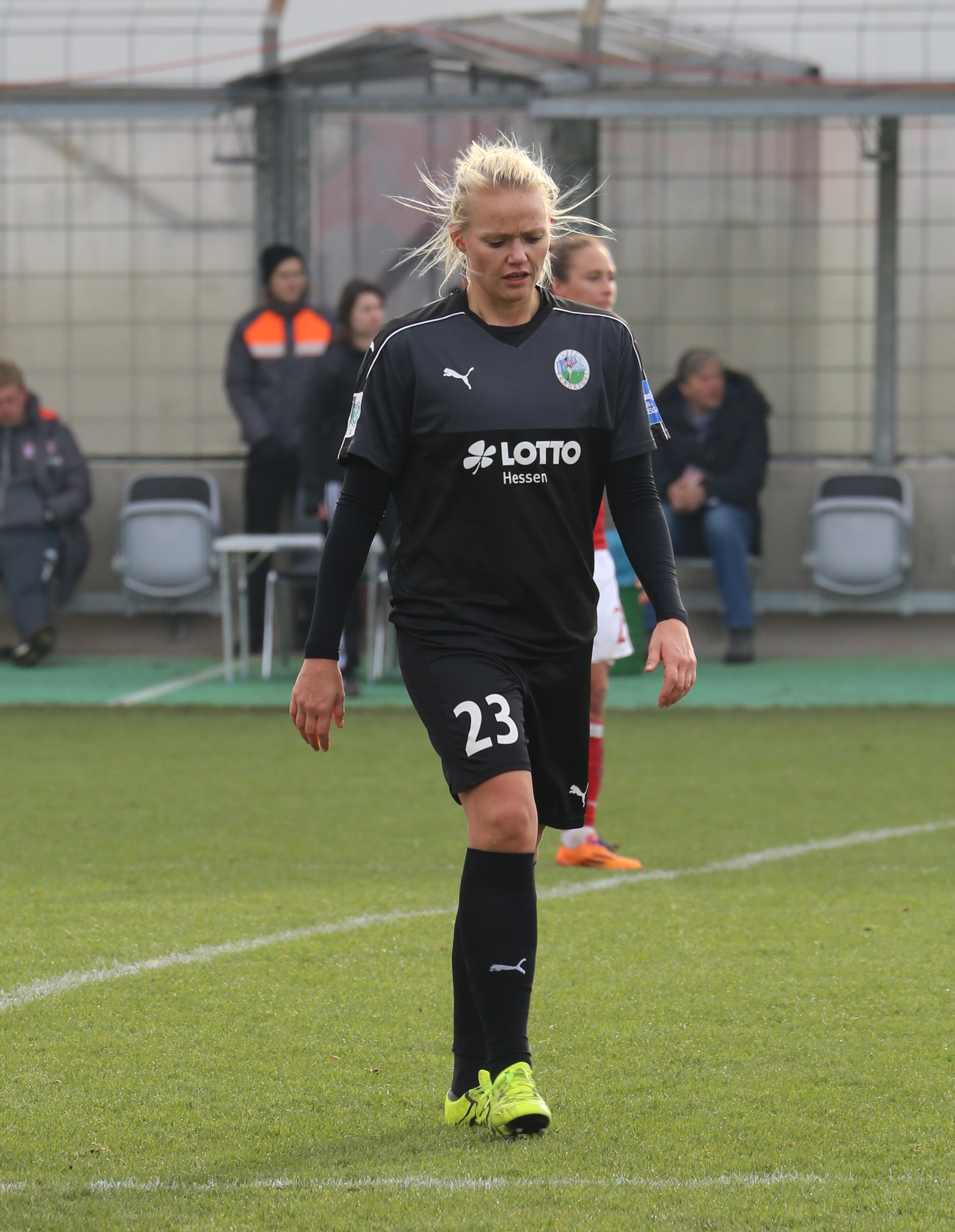 Lise Munk (1. FFC Frankfurt) beim Frauen-Bundesliga-Spiel FC Bayern München gegen 1. FFC Frankfurt am 13. November 2016 im Stadion an der Grünwalder Straße, München (Ergebnis war 1:0).